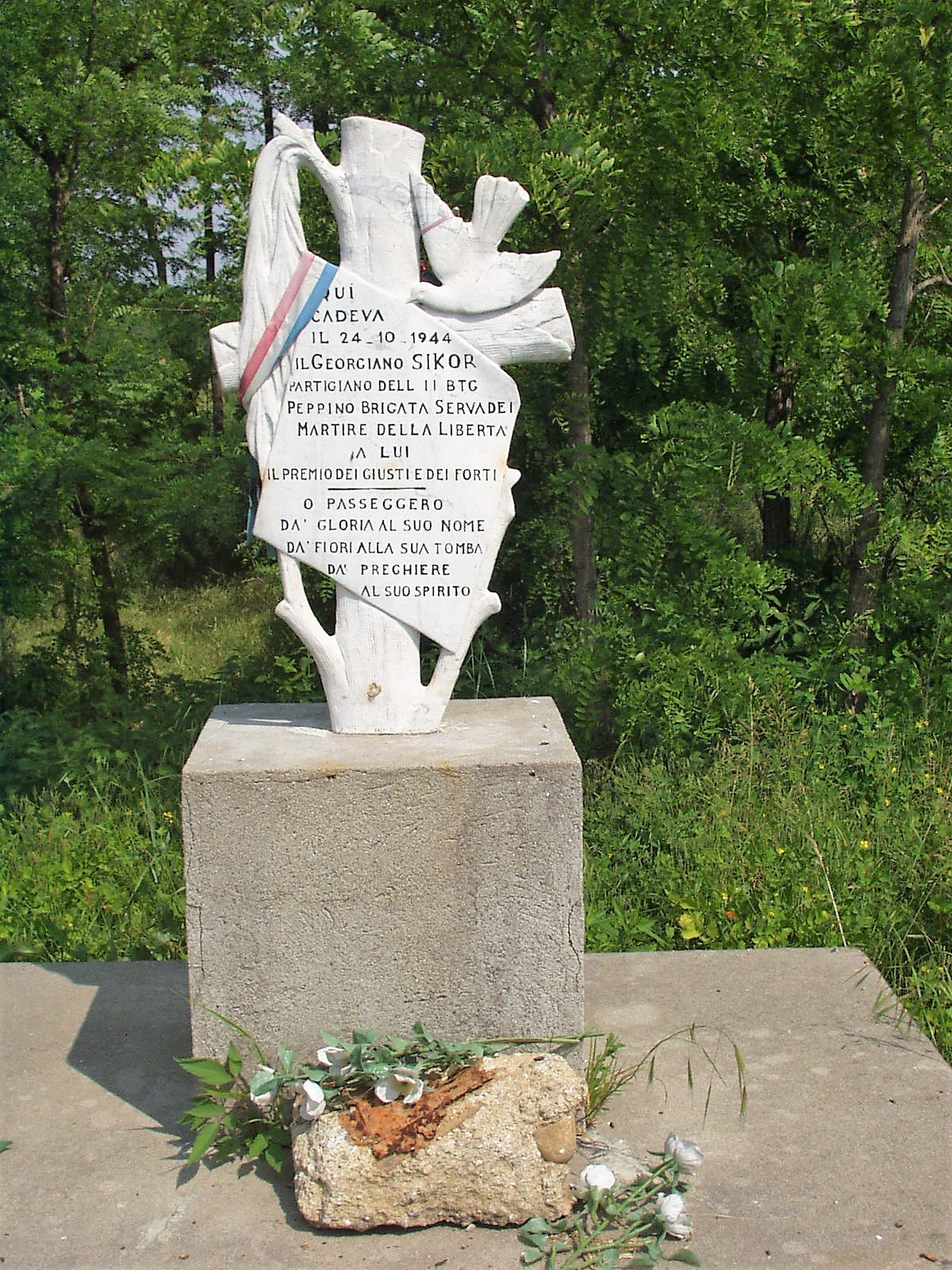 cippo con l'iscrizione dedicata al partigiano ucciso e la data di morte